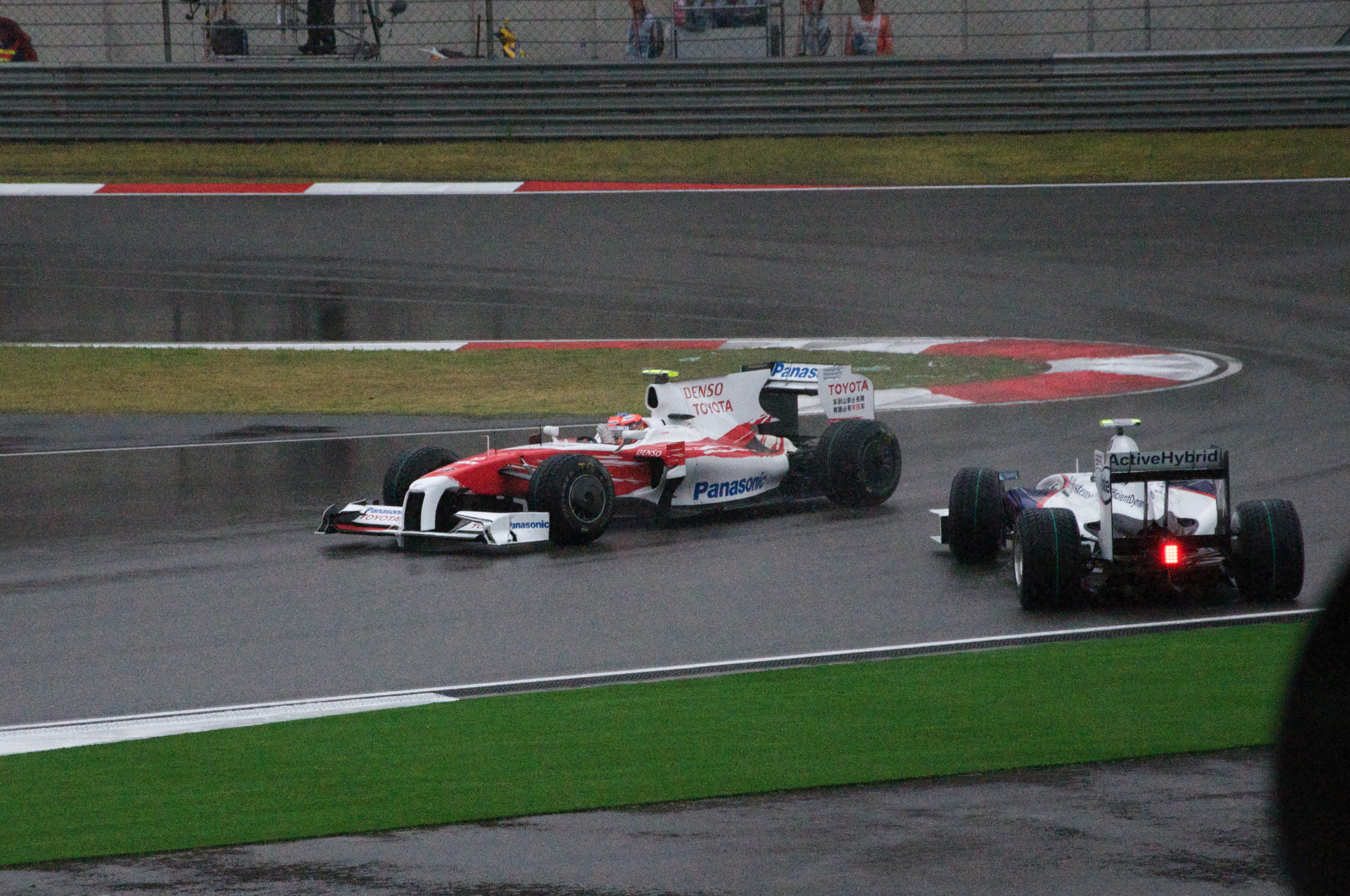 Glock spins Heidfeld